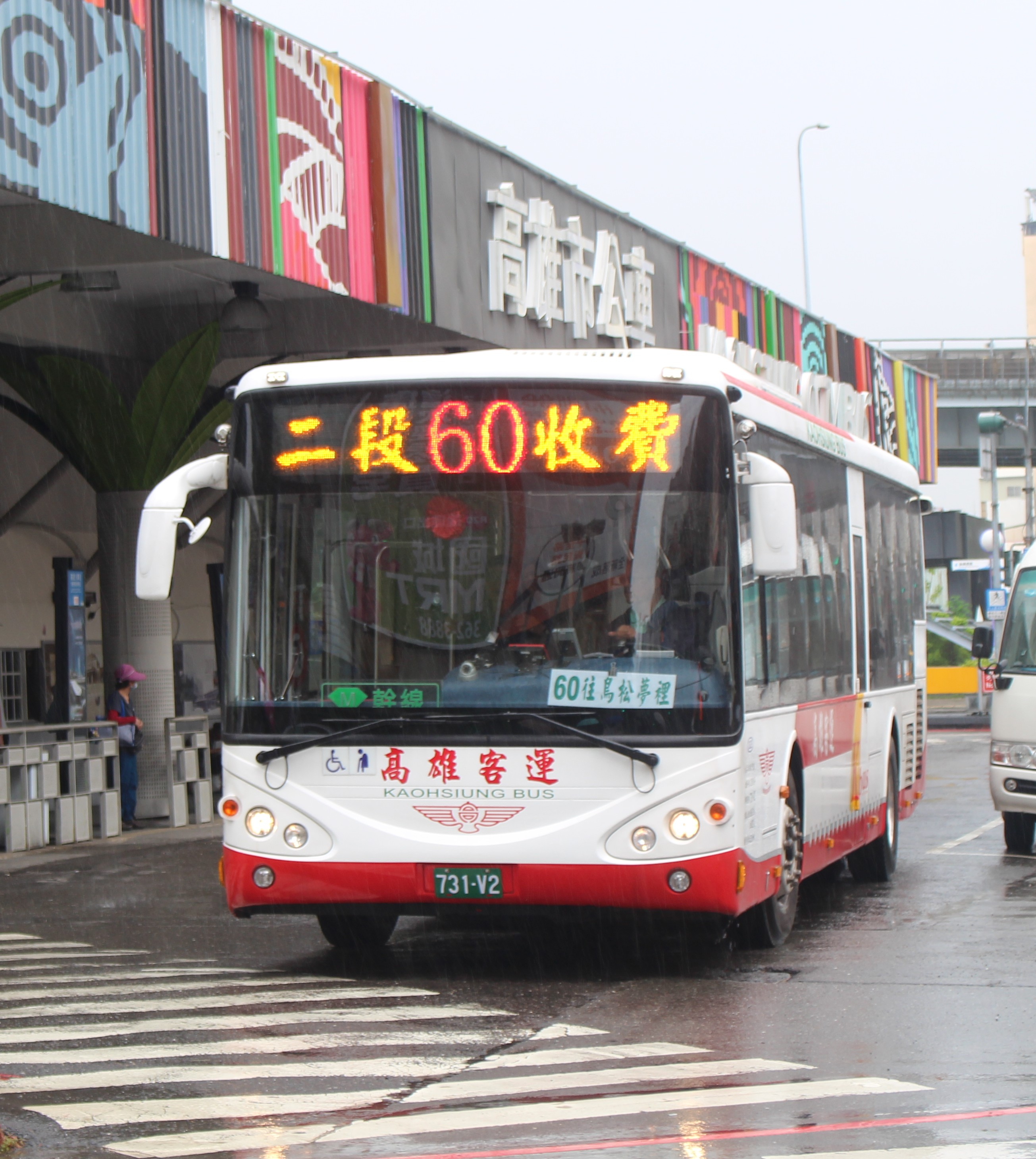 中文（台灣）: 高雄客運申沃SWB6127HG4LE柴油低地板公車731-V2，行駛高雄市公車60線，雨中停靠高雄公車站。